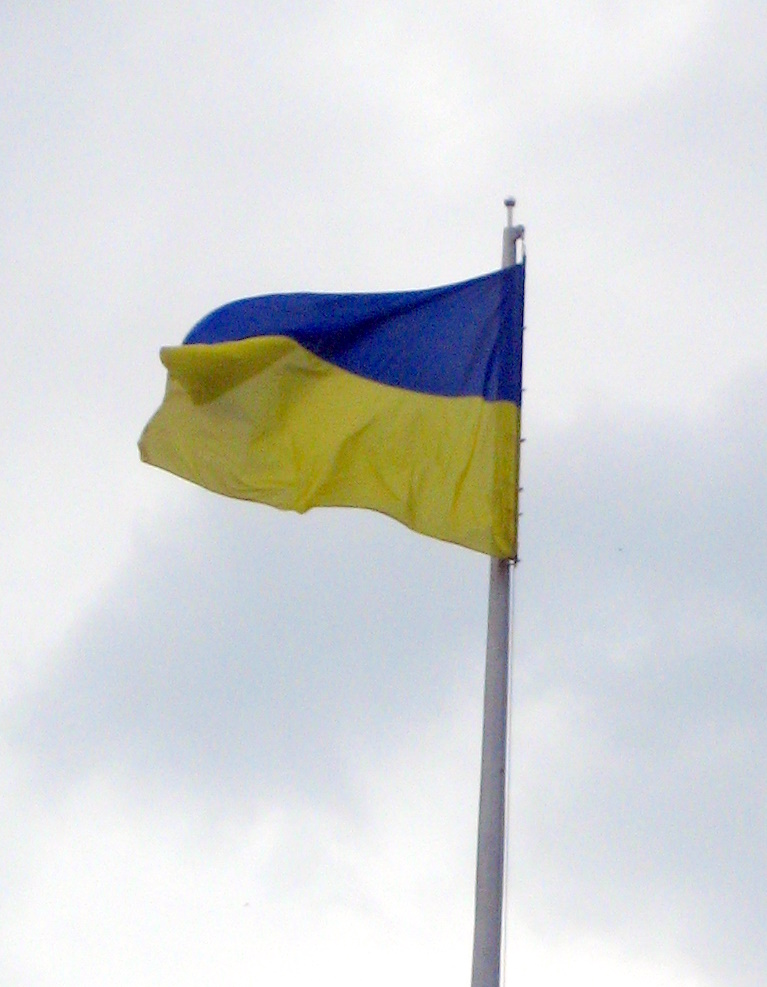 Флаг Украины на Площади Независимости, Киев.